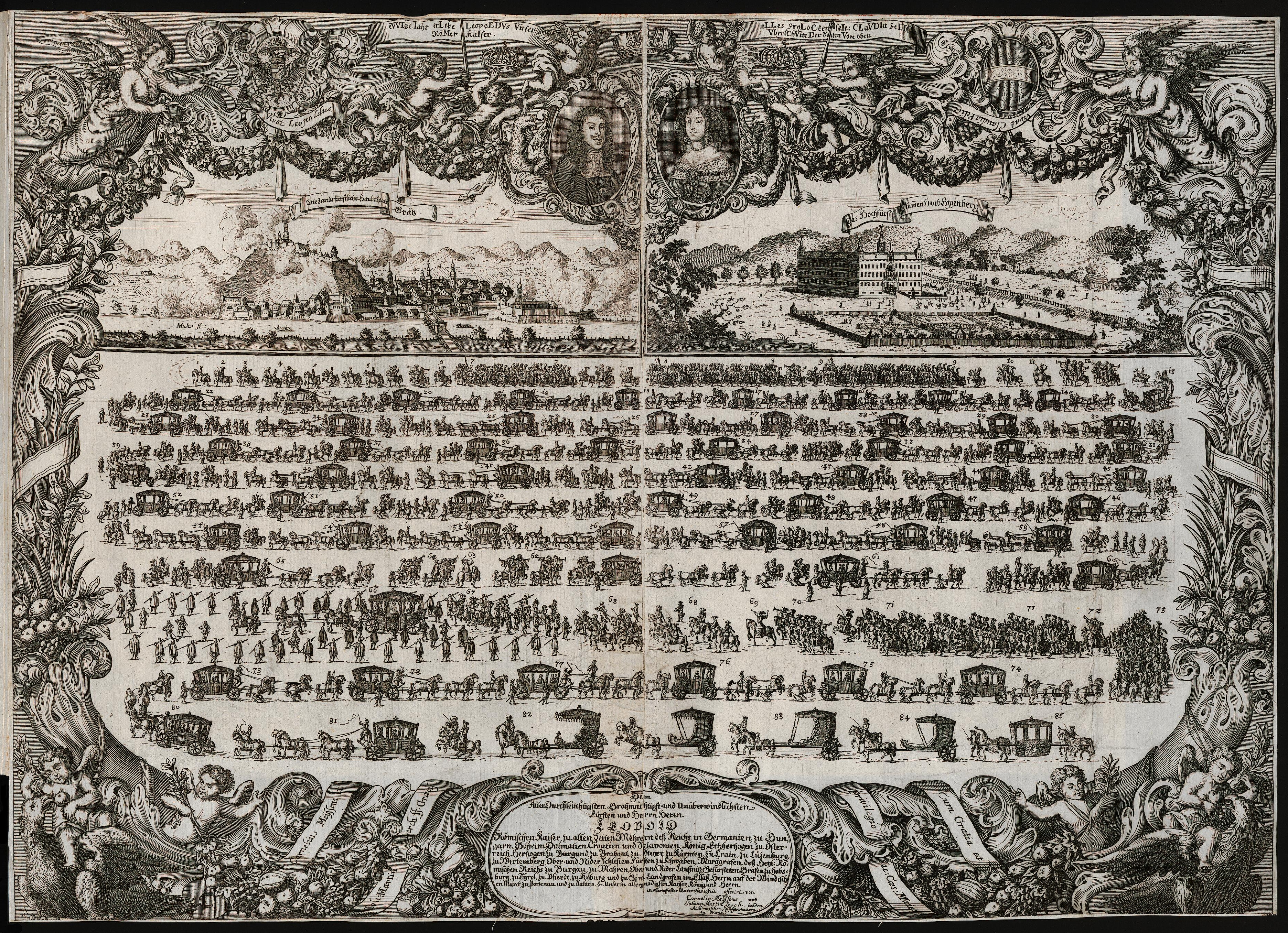 Grafik aus dem Klebeband Nr. 15 der Fürstlich Waldeckschen Hofbibliothek Arolsen Motiv: Festzug zur Hochzeit Kaiser Leopolds mit Claudia Felicitas von Österreich-Tirol, Graz, 15. Oktober 1673 mit Portraits der Brautleute, links oben: Graz, rechts oben: Schloss Eggenberg